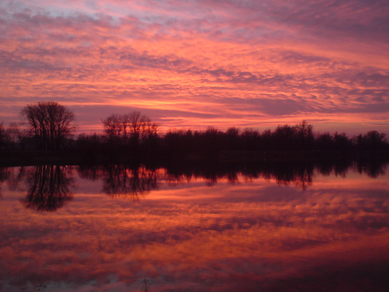 Jarun lake in Zagreb, Croatia